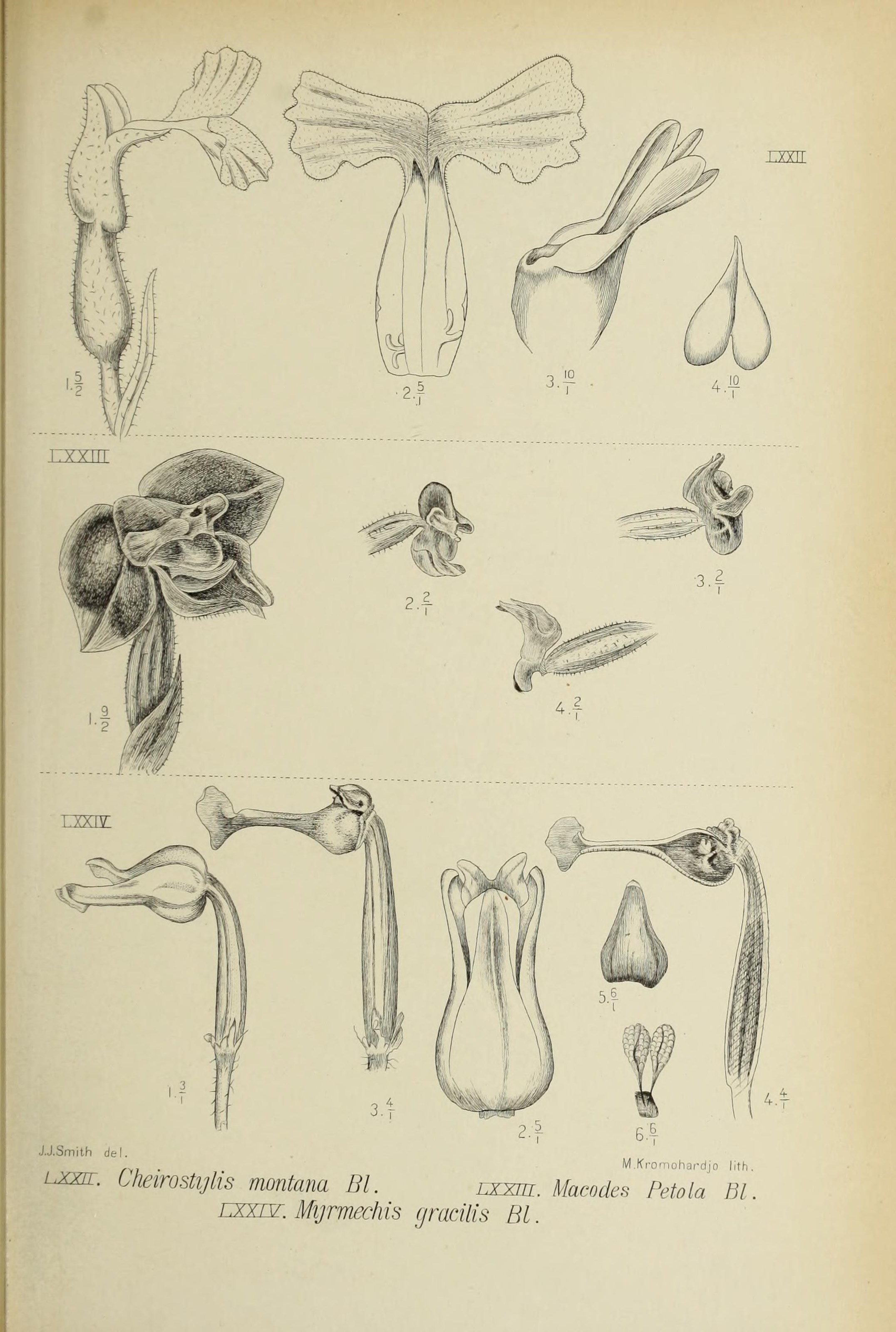 Die orchideen von Java /